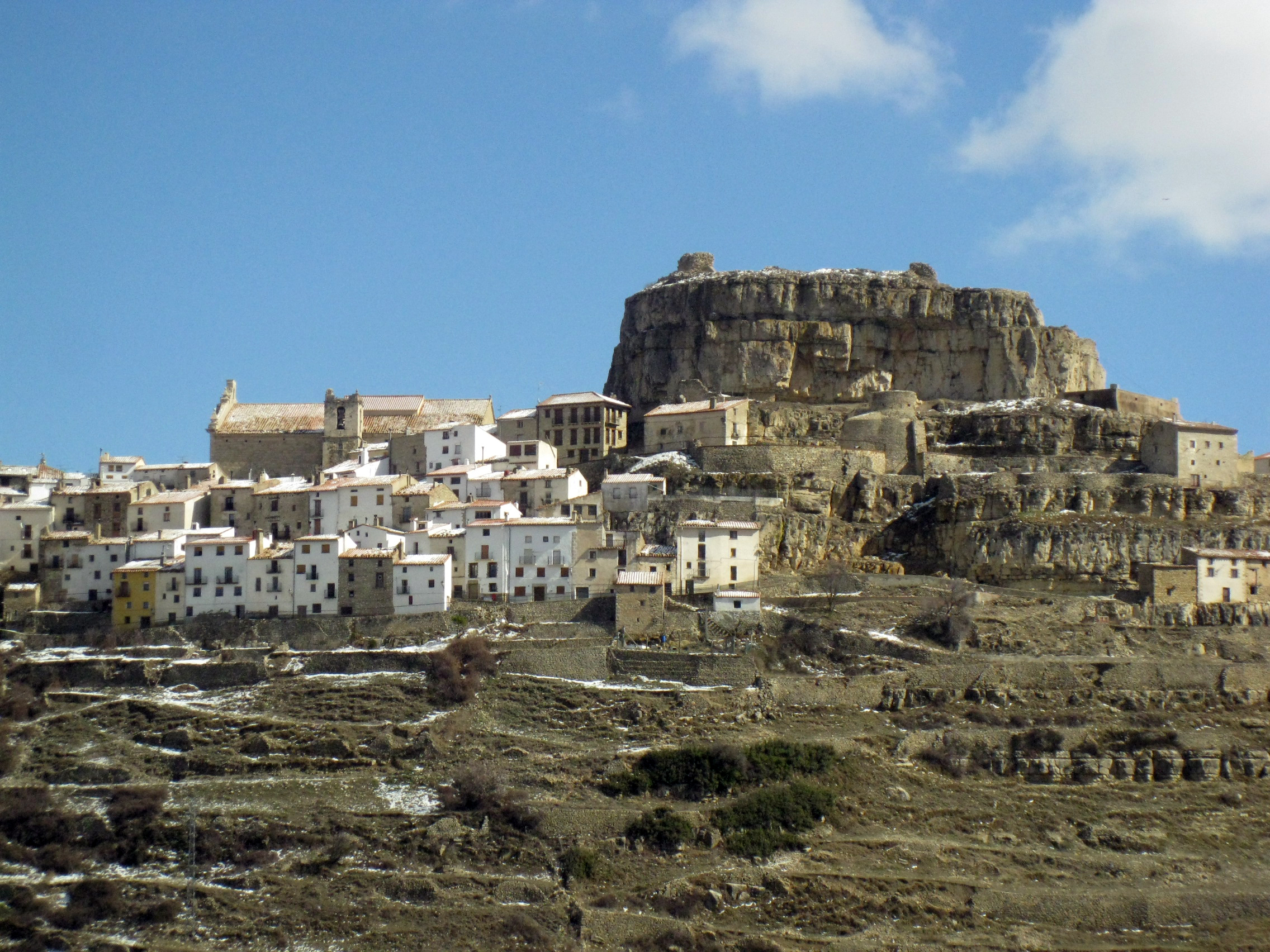 Ares, amb la mola del Castell This is a a photo of a natural area in the Land of Valencia, Spain, with id: ES520059